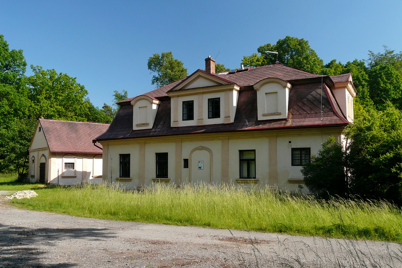 Bývalé lovecké pavilony na Valdštejnsku